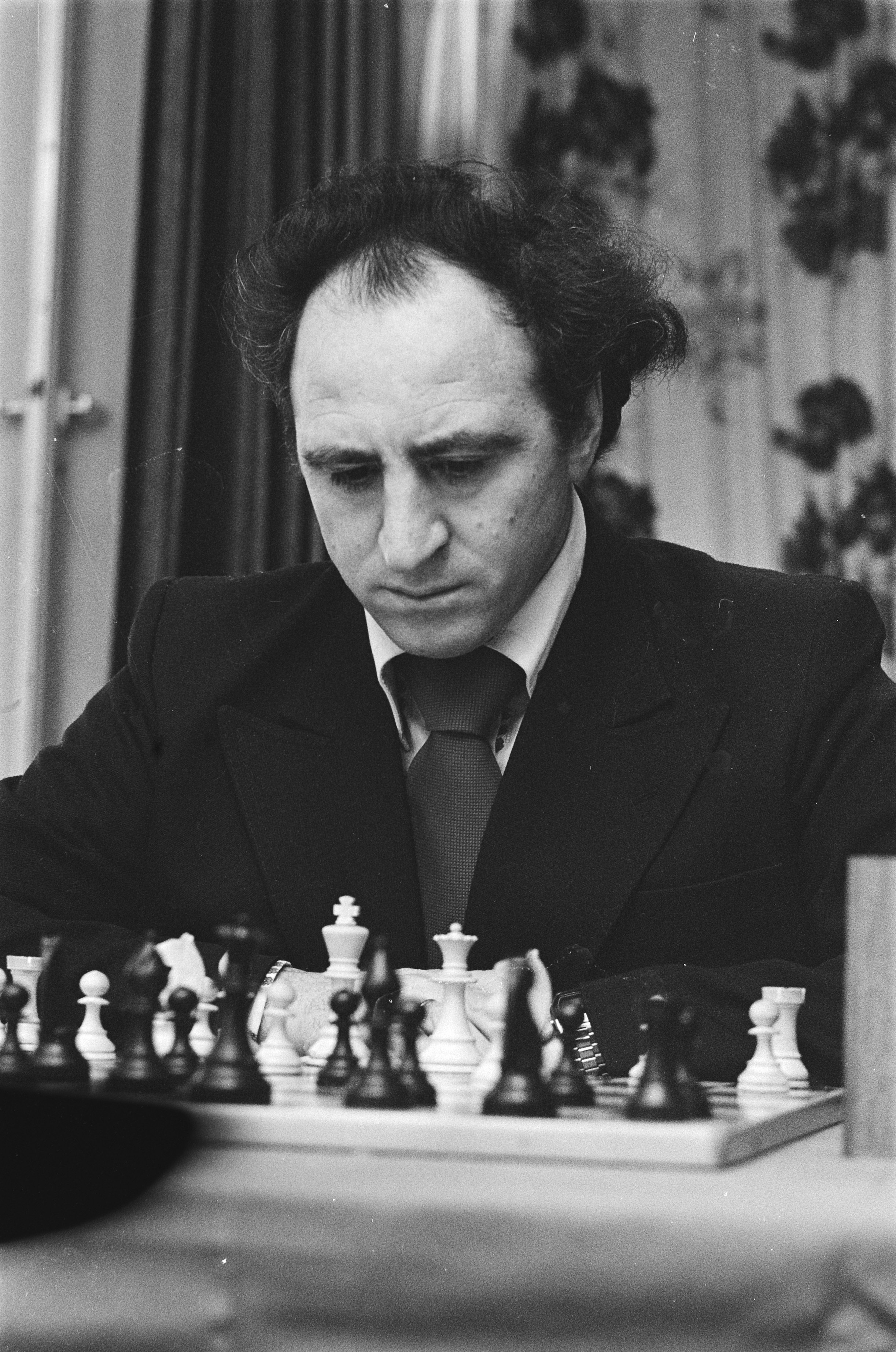 Hoogovenschaaktoernooi 1979; Polugagajevski in actie.